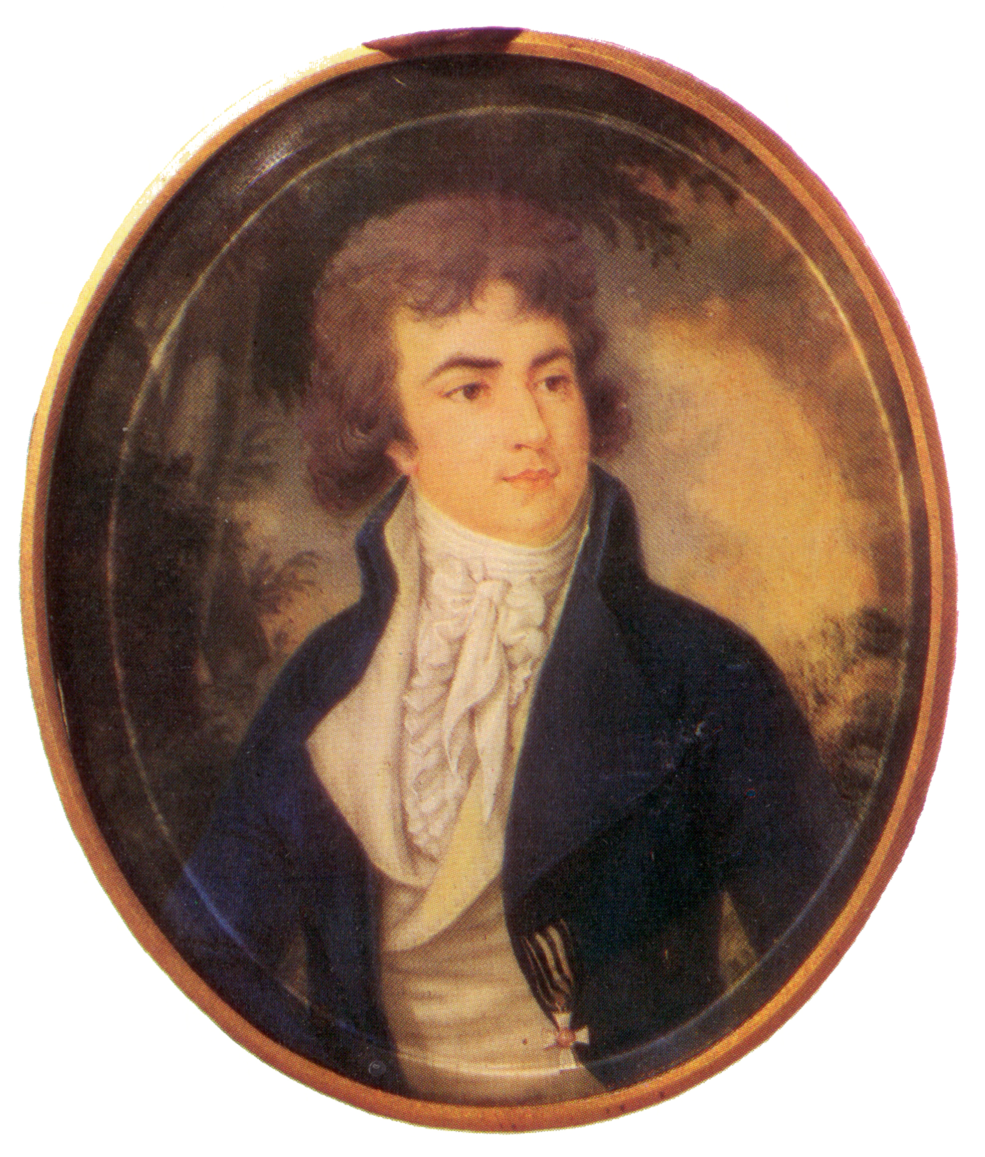 Князь Иван Алексеевич Гагарин (1771-1832), сенатор.